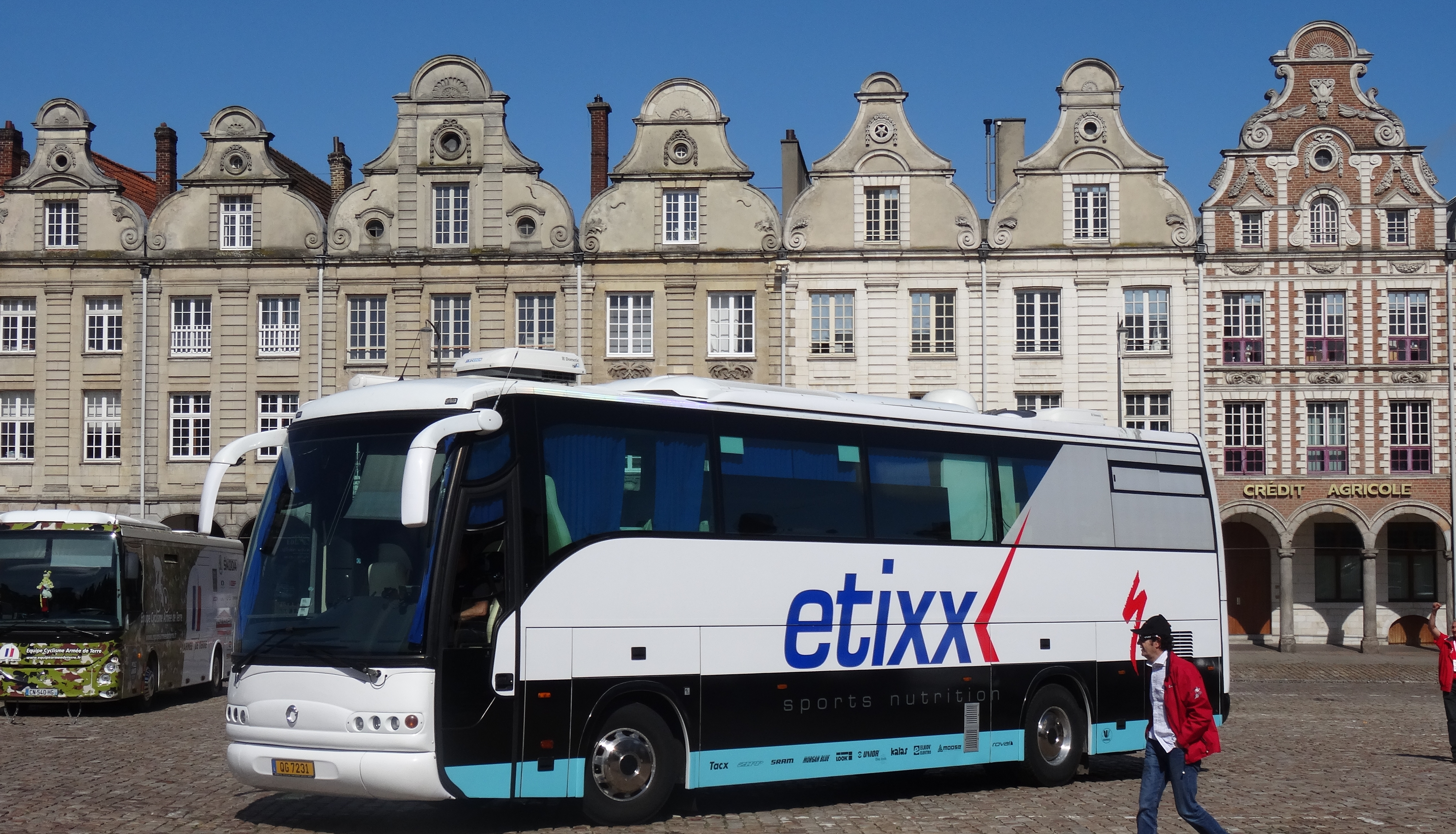 Reportage photographique réalisé le dimanche 25 mai 2014 à l'occasion du départ et de l'arrivée de la troisième étape du Paris-Arras Tour 2014 à Arras, Pas-de-Calais, Nord-Pas-de-Calais, France.